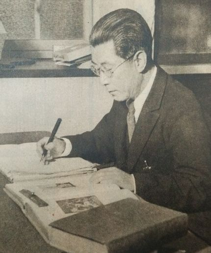 原久一郎